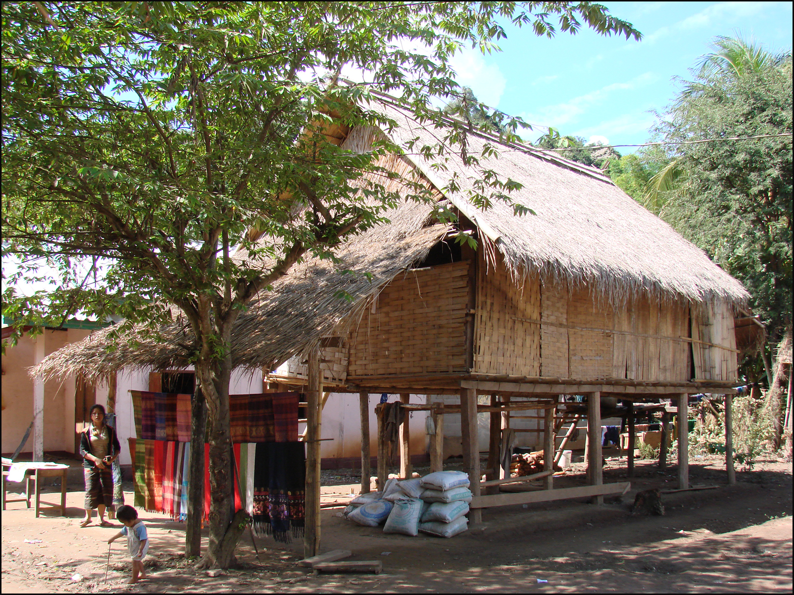 La maison lao est une habitation sur pilotis. Ici un village proche de Pak Ou ayant reçu un label pour ses activités artisanales.